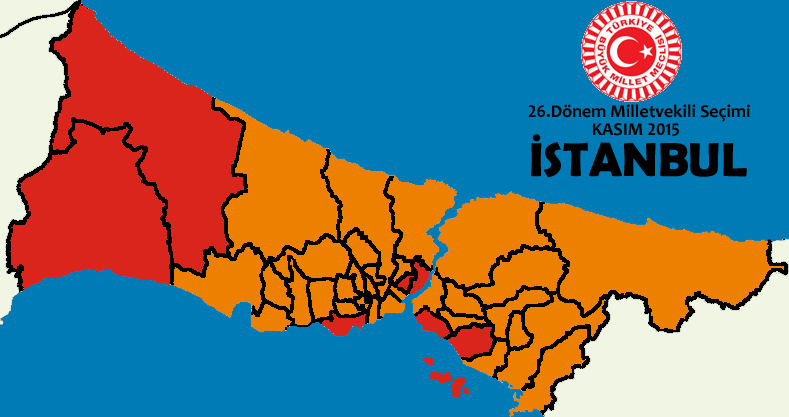 Kasım 2015 seçimleri